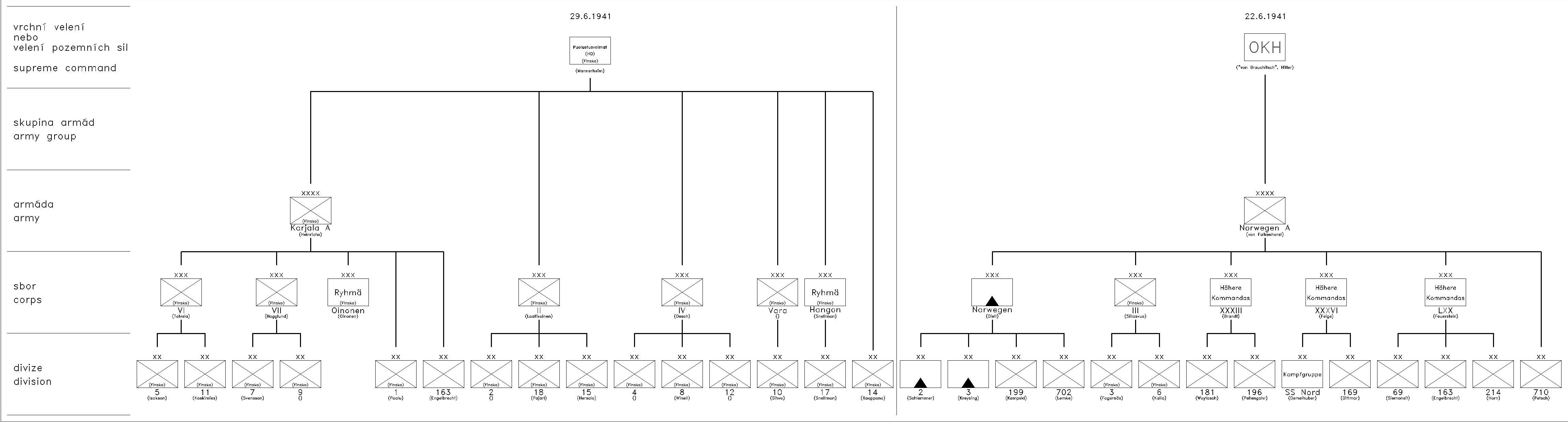 Německé jednotky v Norsku a Finsku na začátku operace Barbarossa. + Finské jednotky, které se účastnili útoku proti SSSR.